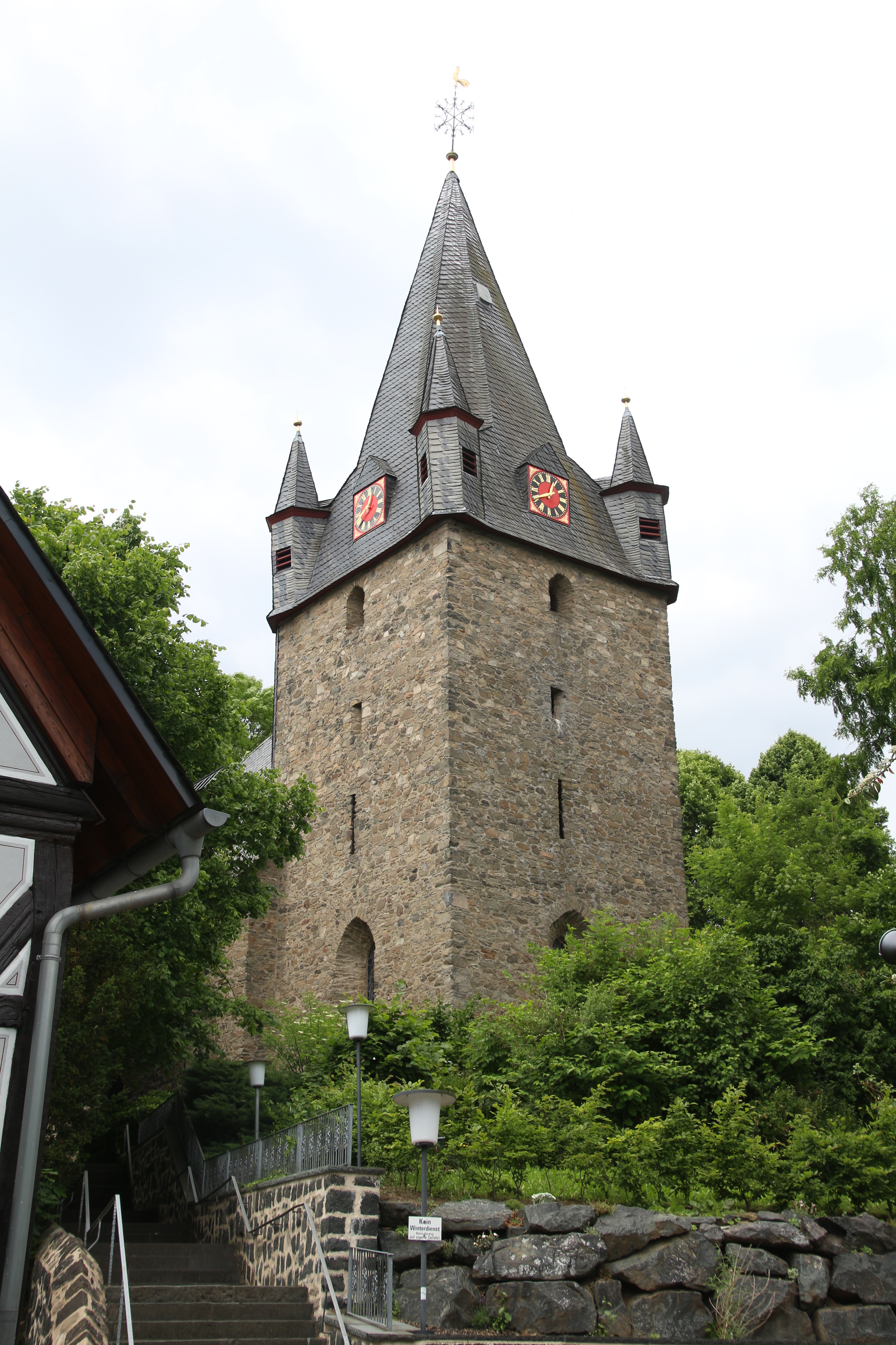 Evangelische Kirche Lixfeld, Landkreis Marburg-Biedenkopf, Hessen